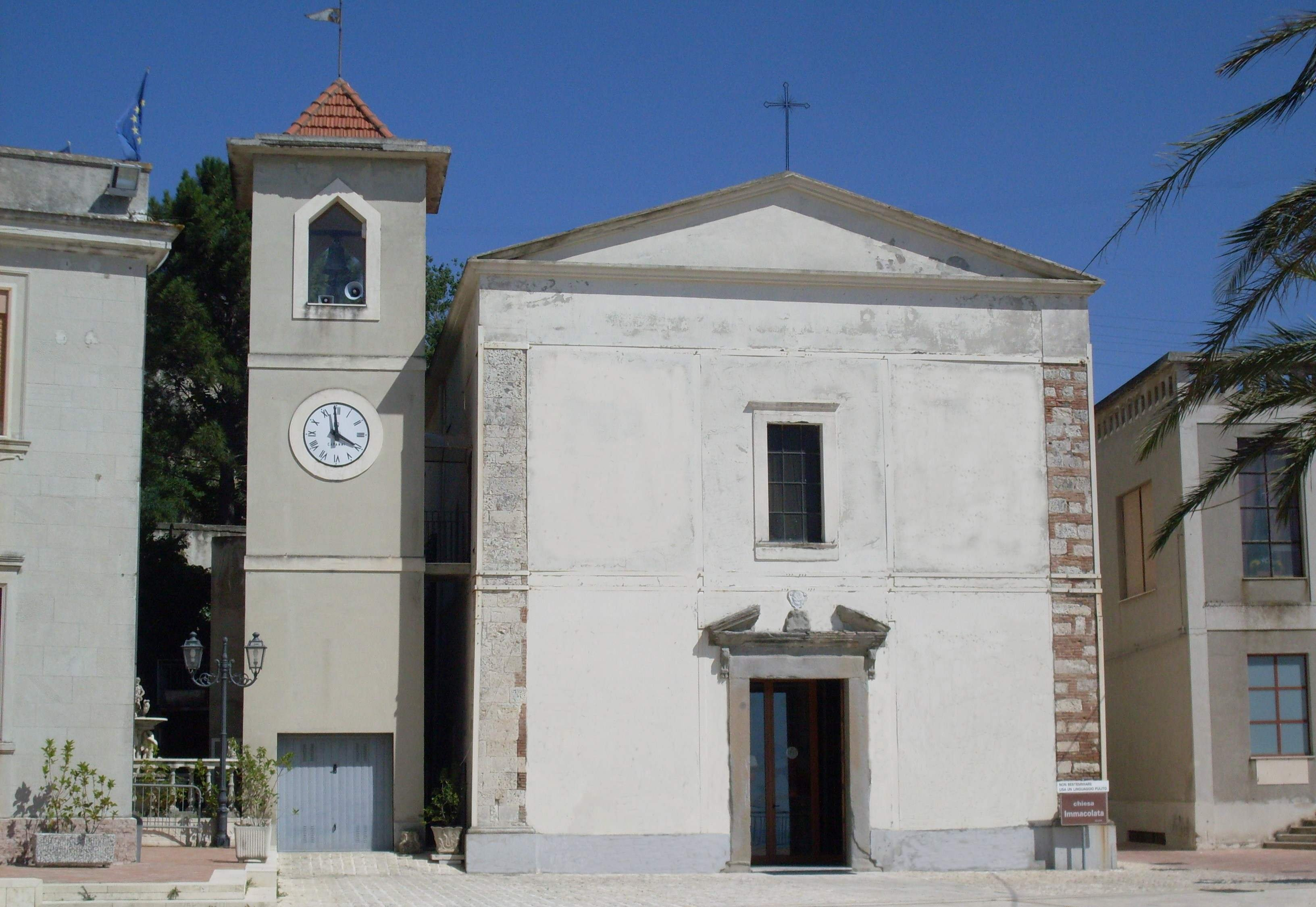 Foto della chiesa dell'Immacolata a Venetico Superiore